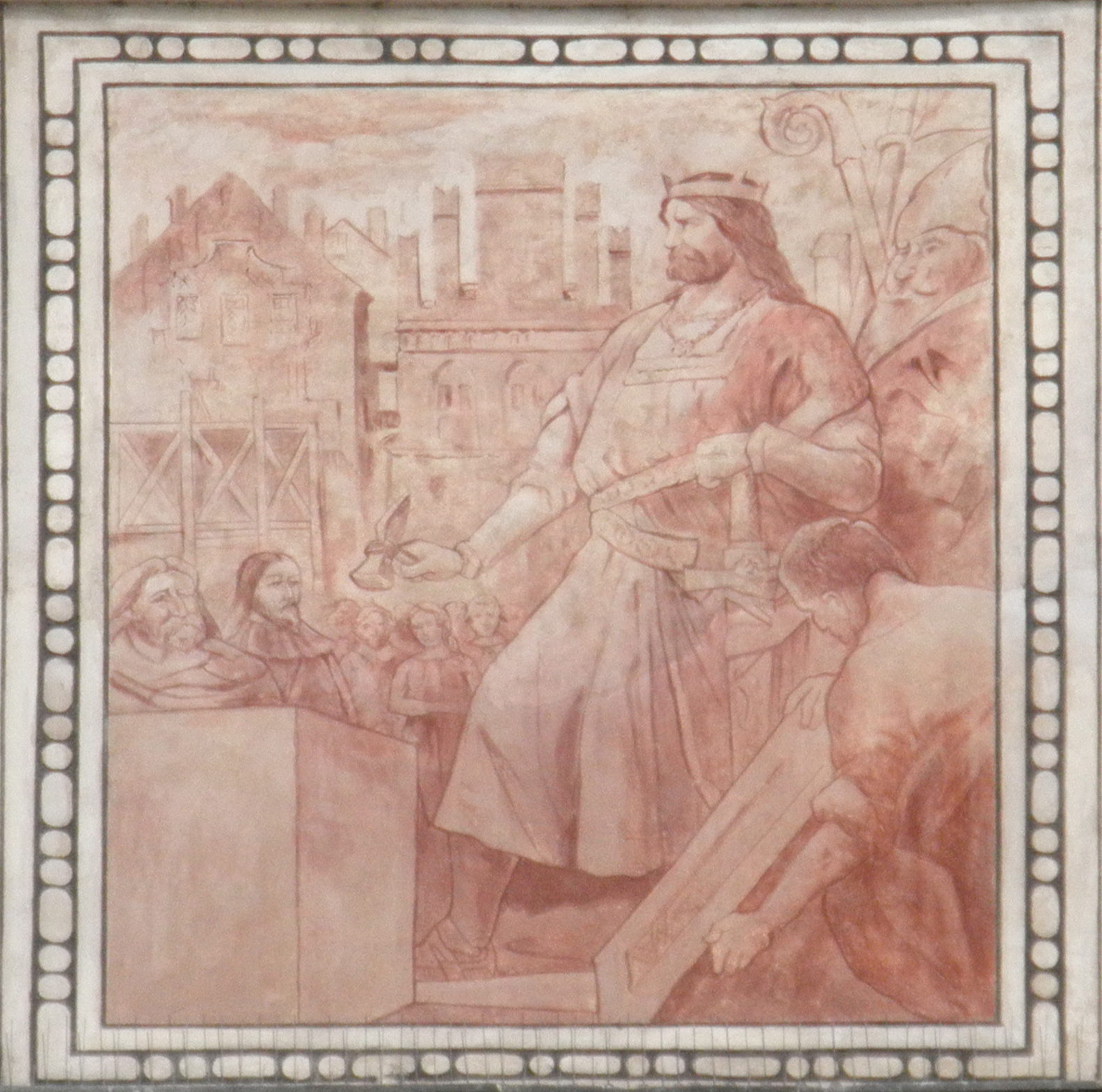 Radnice (Kolín), Karlovo nám. 77, Kolín. Freska: "Karel IV. pokládá základní kámen k přestavbě chrámu sv. Bartoloměje v Kolíně". Autor: Adolf Liebscher.